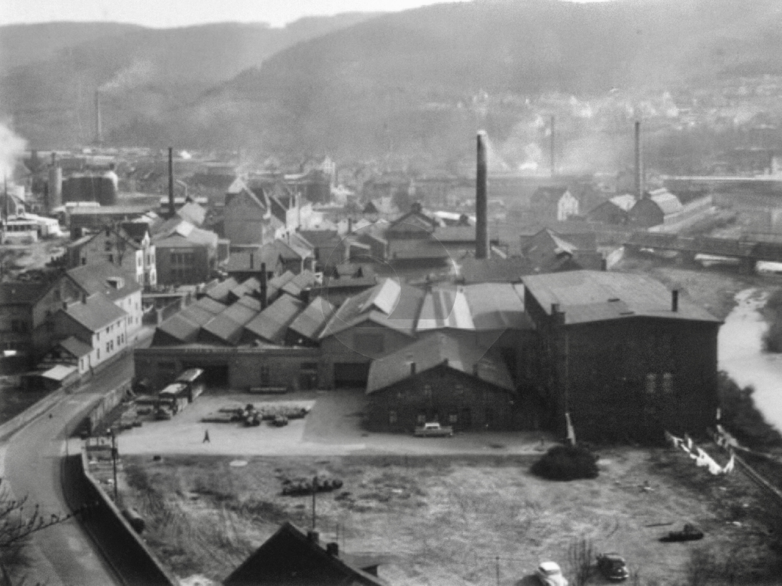 Stammwerk Oege, Mitte des letzten Jahrhunderts